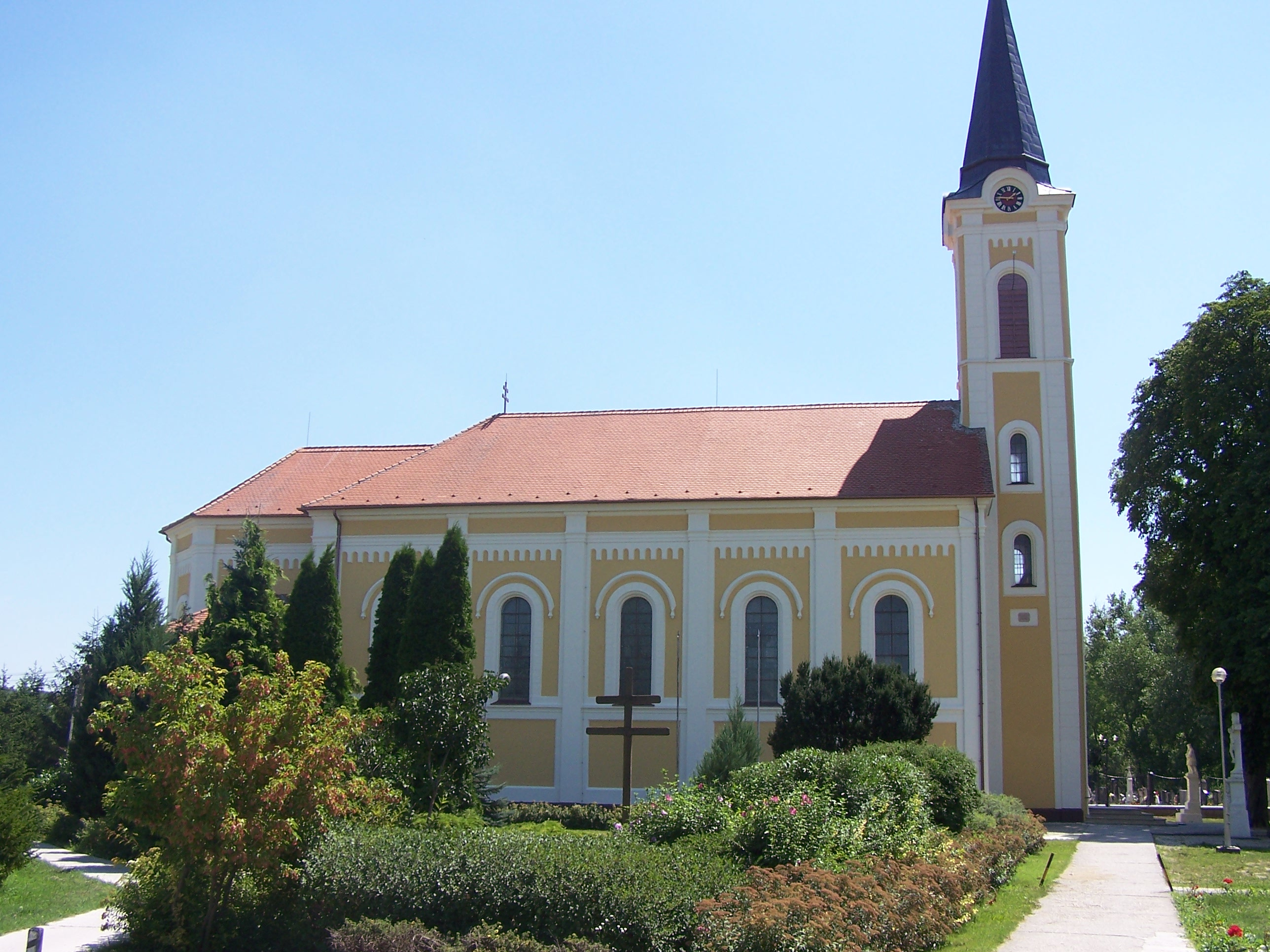 R. k. templom (Agyagosszergény, Kossuth Lajos utca) This is a photo of a monument in Hungary, Identifier: 3980